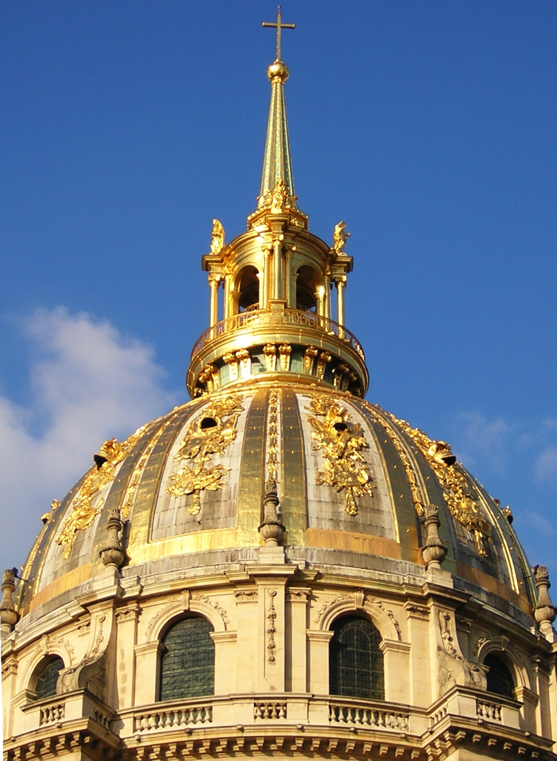 Dôme de l'église des Invalides - Paris (75), France.